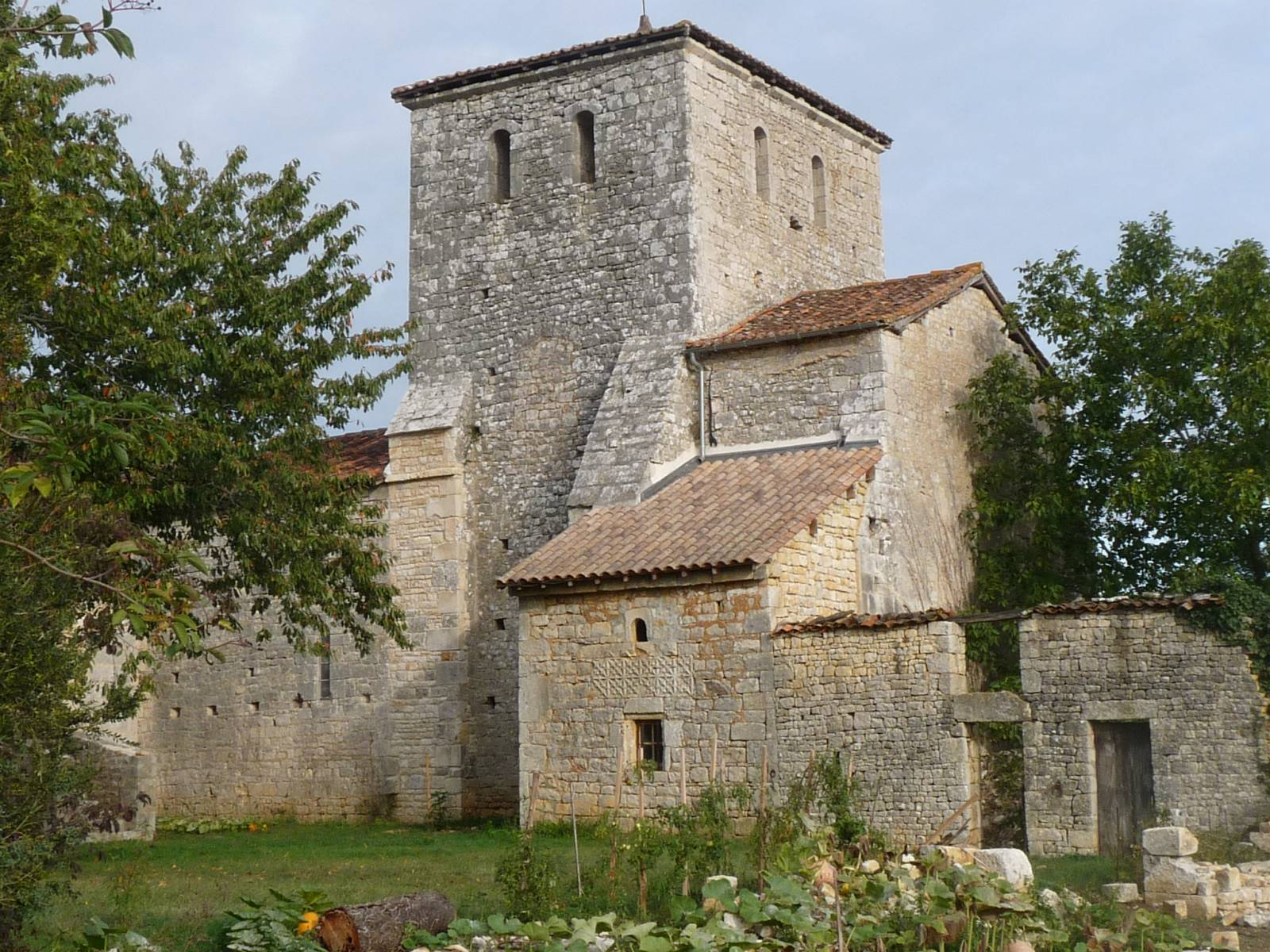 église de Ventouse, Charente, France